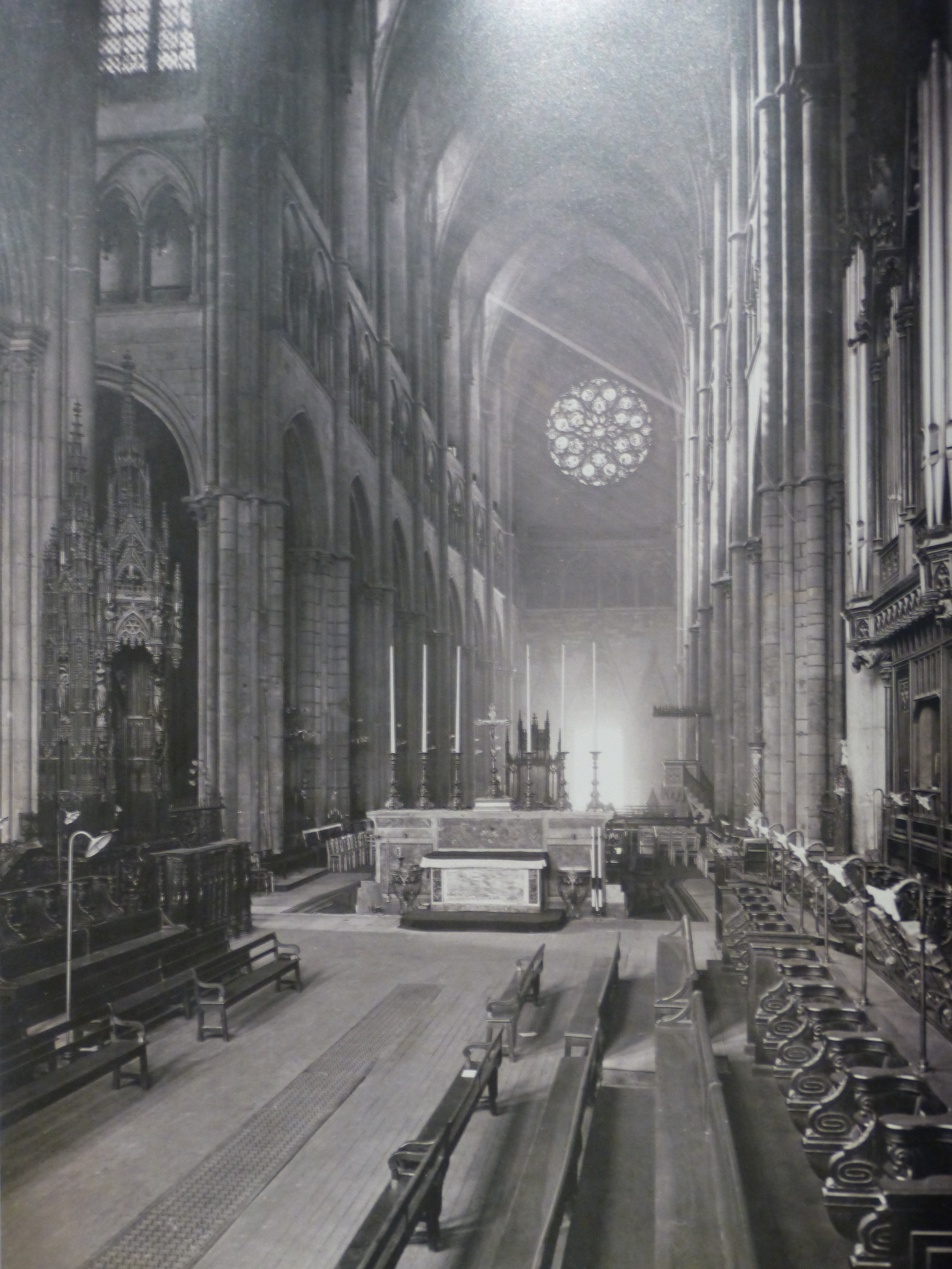 Le chœur et la nef de la primatiale Saint-Jean de Lyon, photographie anonyme du XIXe siècle ; vue de l'est vers le portail ; la disposition ancienne des lieux n'est pas la même qu'aujourd'hui (autel à la croisée du transept, stalles des chanoines dans le chœur)